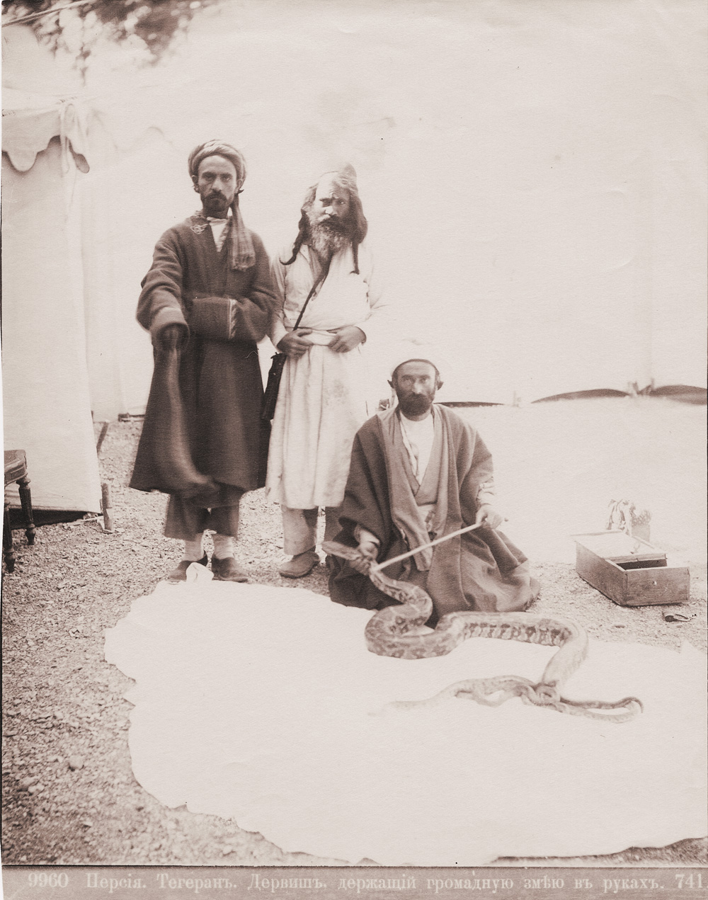 Ermakov photo